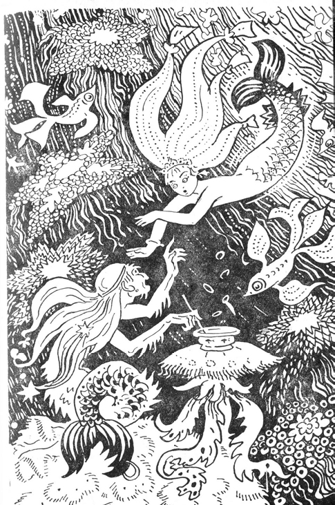 Иллюстрация к сказке Андерсена "Русалочка". Художник Д. А. Брюханов